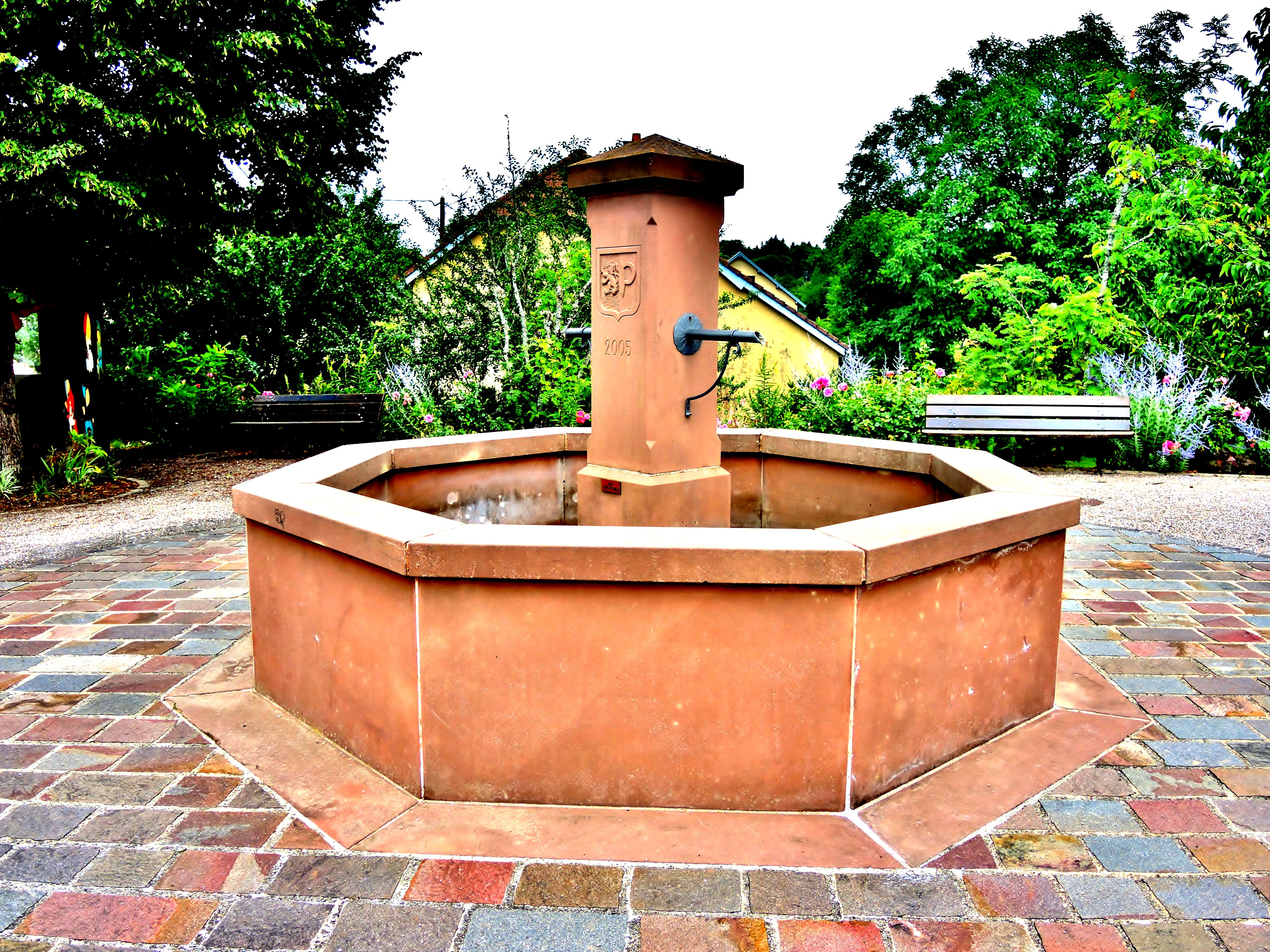 Fontaine devant la mairie de Petitmagny. Territoire de Belfort.